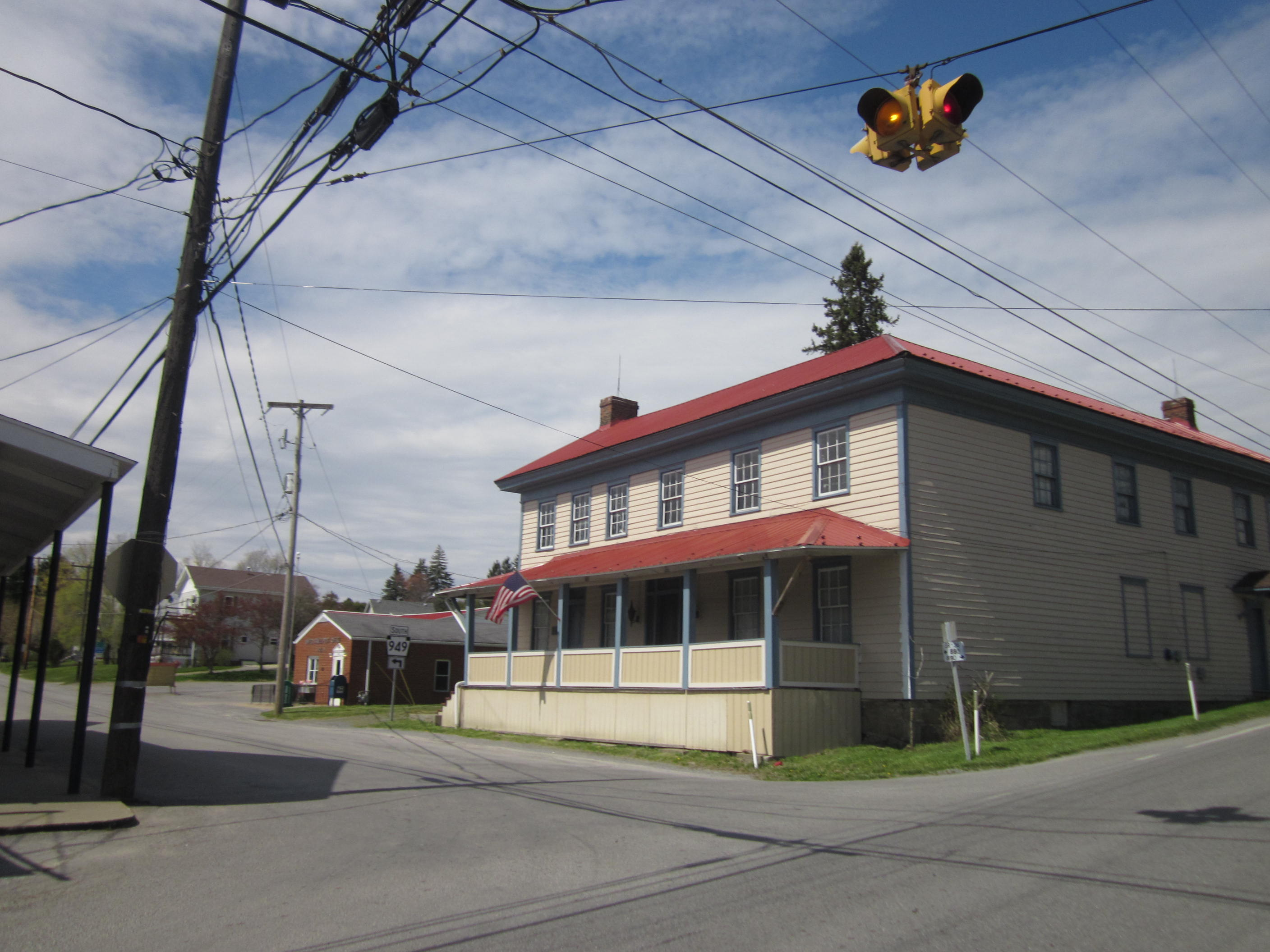 Sigel, Pennsylvania